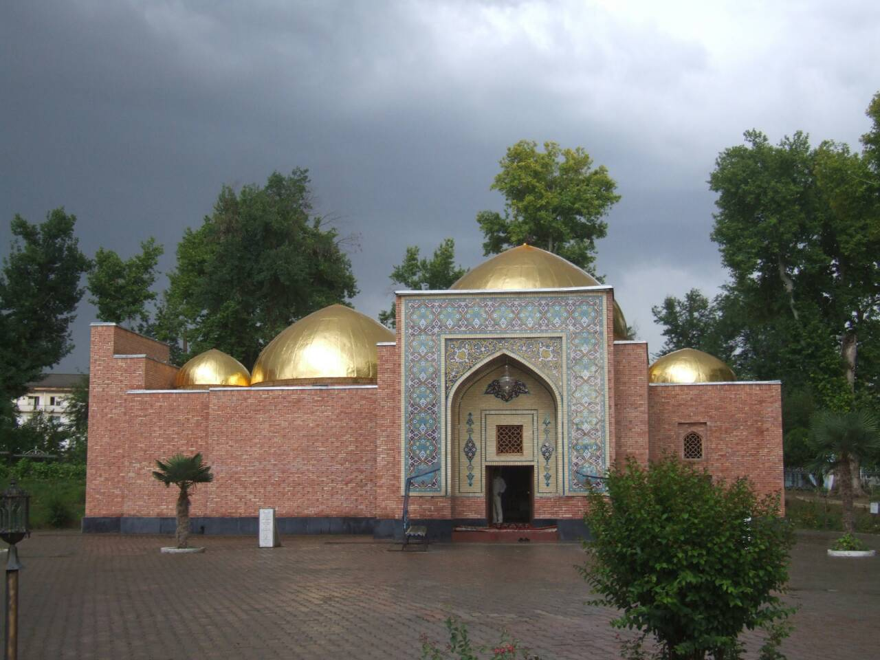 tomb of said-ul-auliya sayid ali hamdani